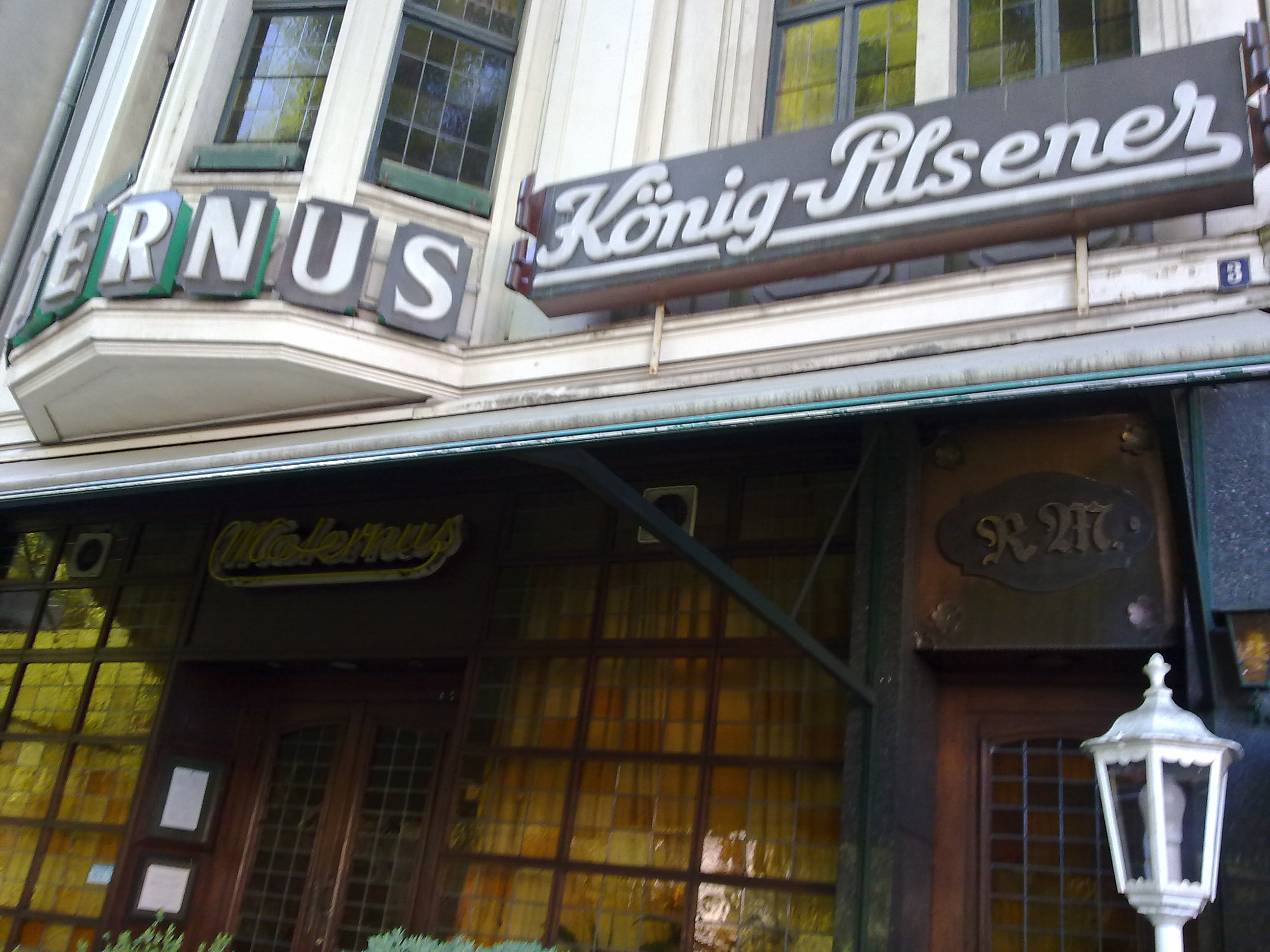 Weinhaus Maternus, Löbestraße 3, Bad Godesberg (mit den Initialen R.M.)